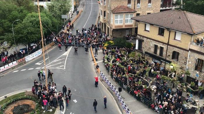 Donien atxa Abadiñon